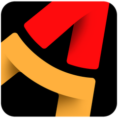 Logo de Aragón TV desde el 21 de abril de 2013